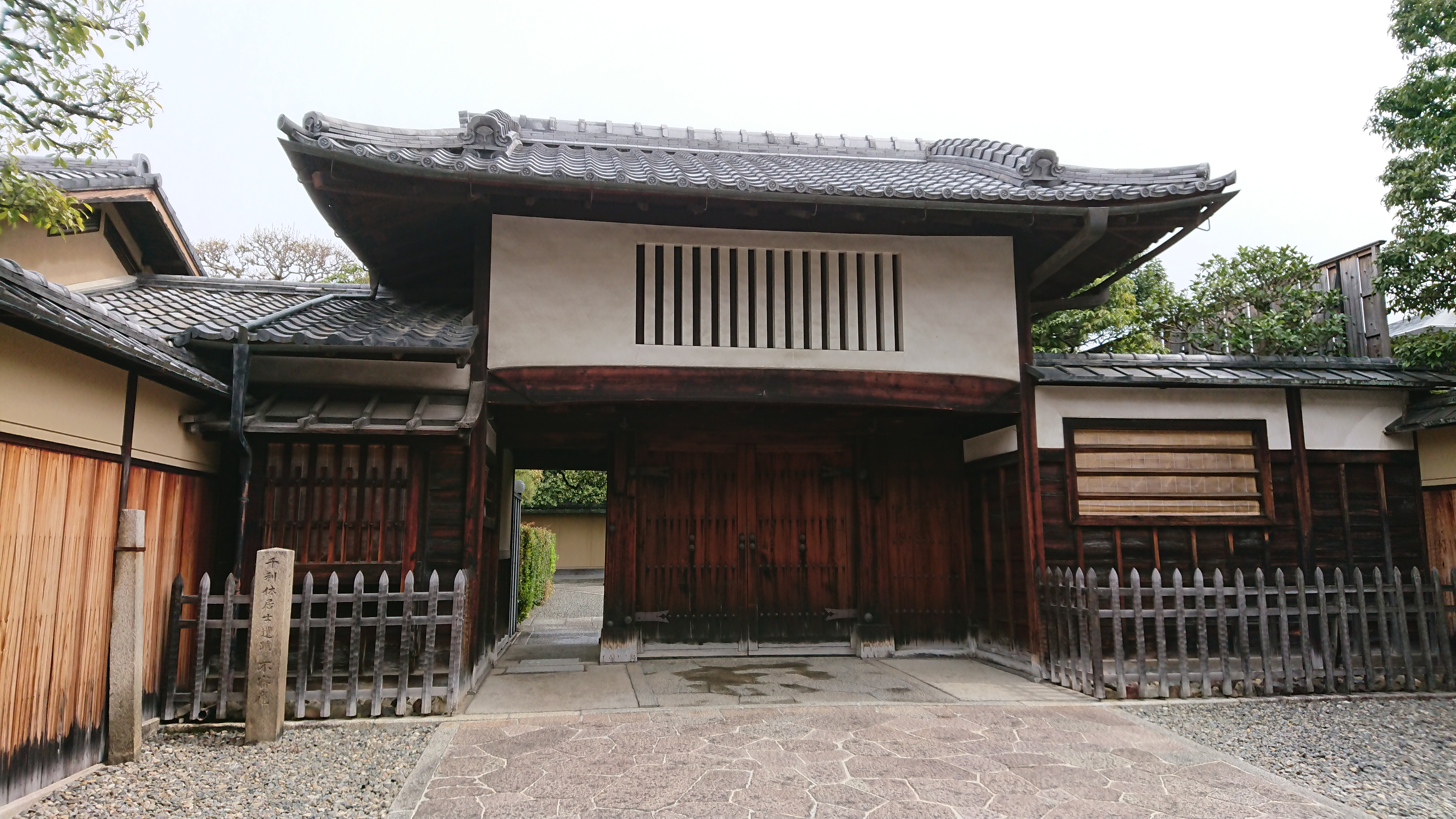 表千家不審庵屋敷表門